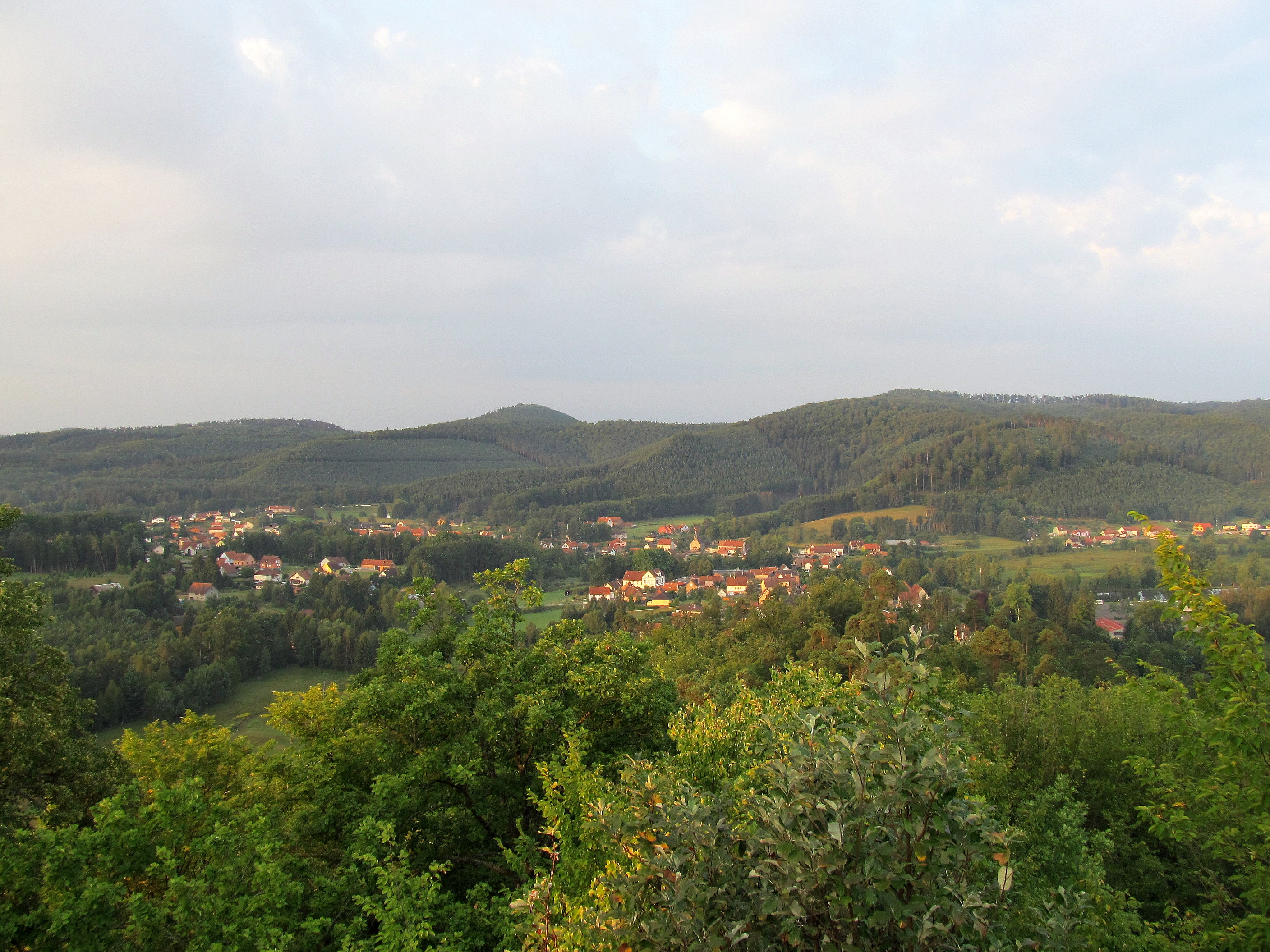 Baerenthal: vue sur le village prise du château du Ramstein